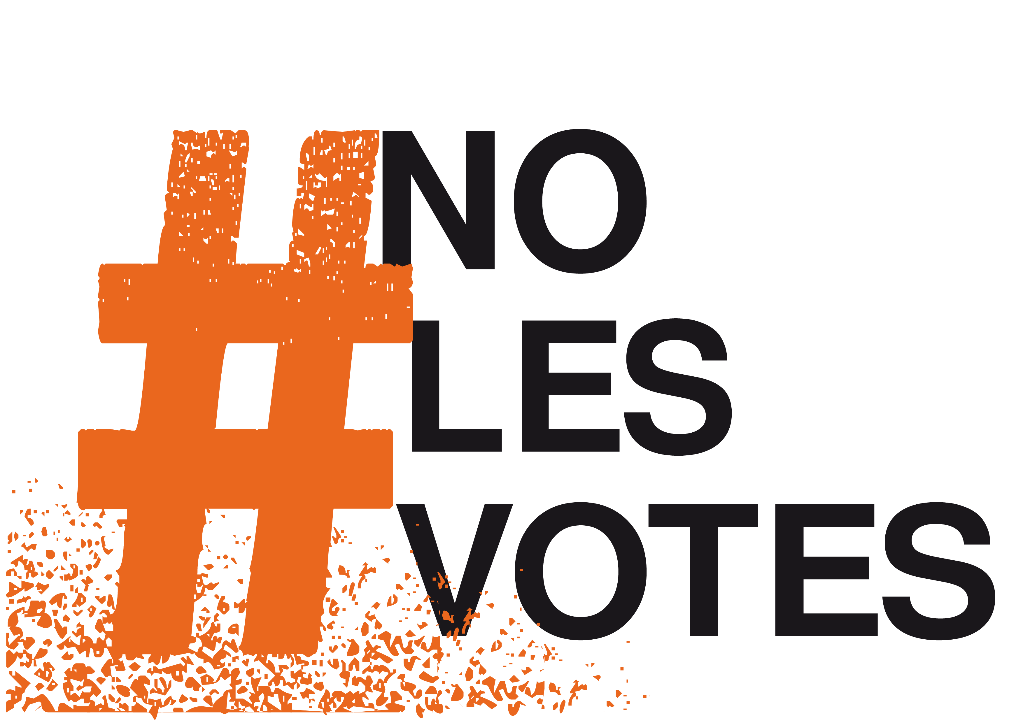 Uno de los logotipos del movimiento NoLesVotes